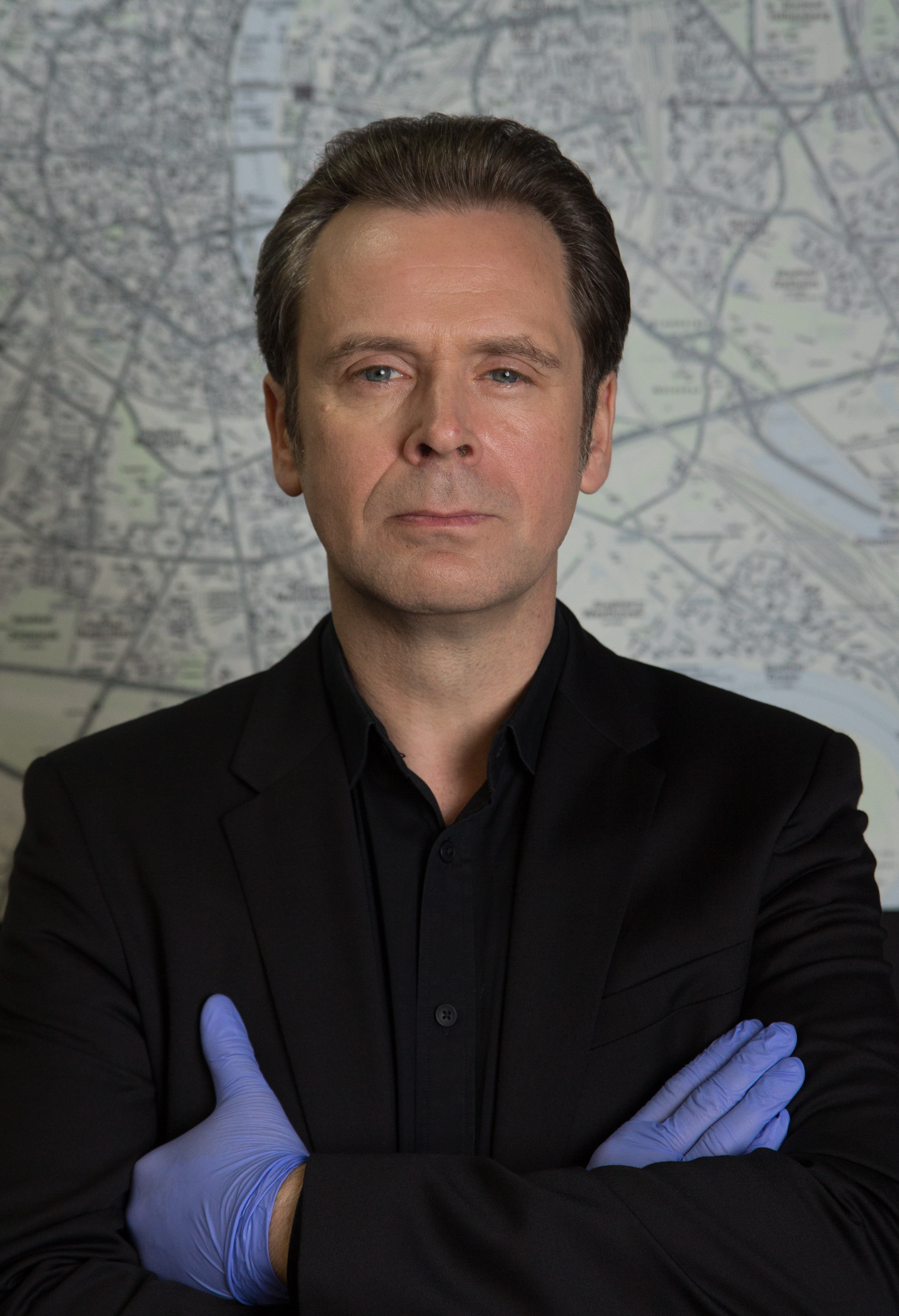 Pressetermin am Set der ZDF-Krimiserie Professor T. mit den Hauptdarstellern Matthias Matschke, Andreas Helgi Schmid, Paul Faßnacht, Julia Bremermann und Axel Schneider